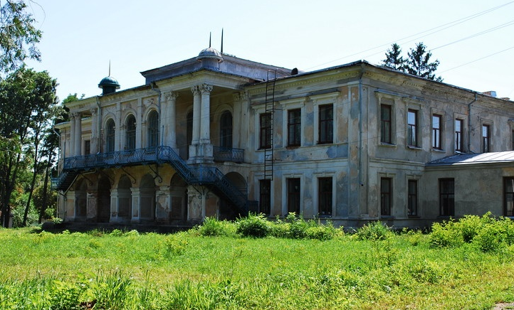 Залишки палацу Закревських: Залишки палацу Закревських у с. Березова Рудка